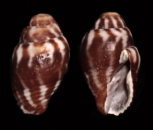 Vexillum (Pusia) cavea (Reeve, 1844)